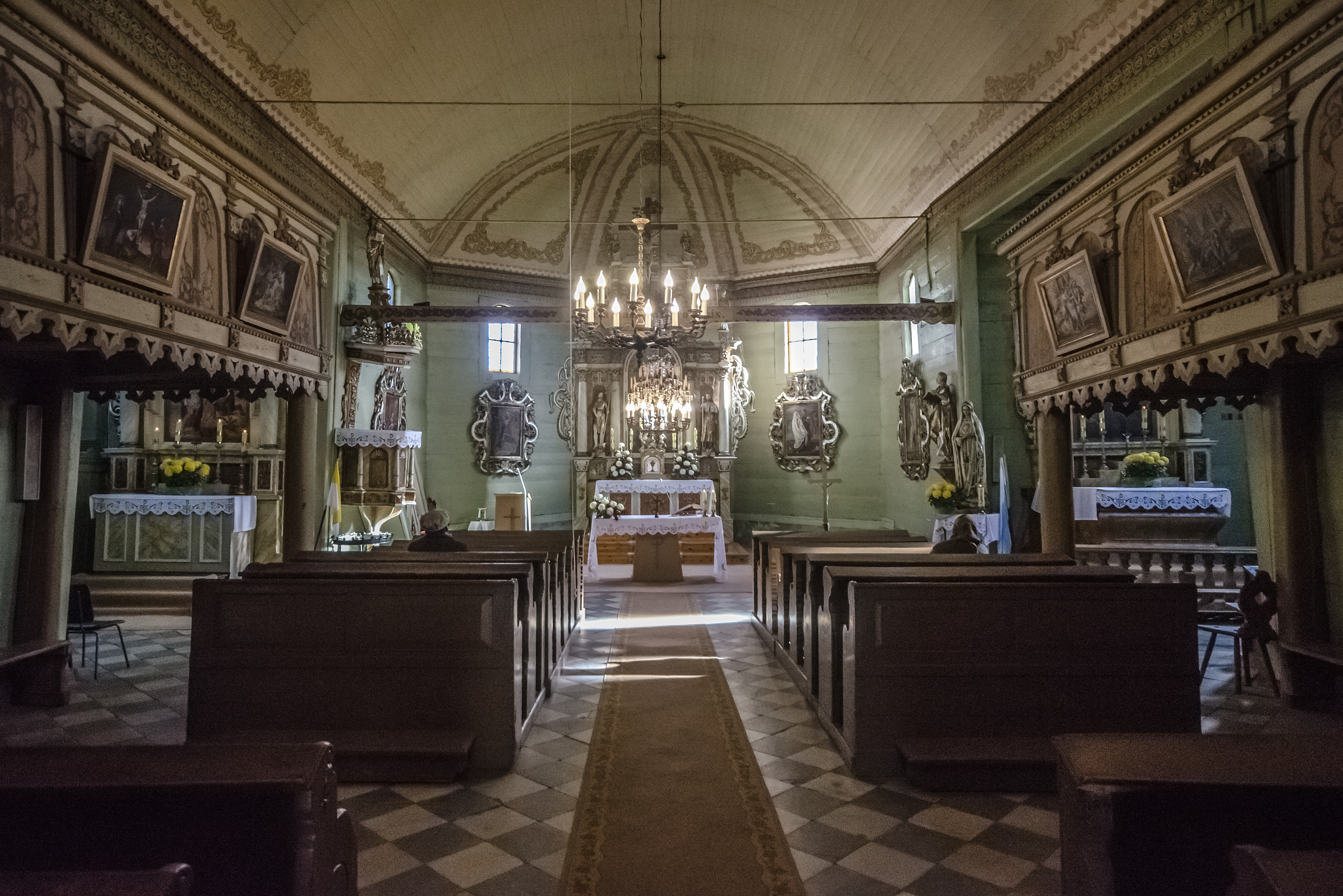 Gościęcin, kościół odpustowy pw. św. Brykcjusza, 1661